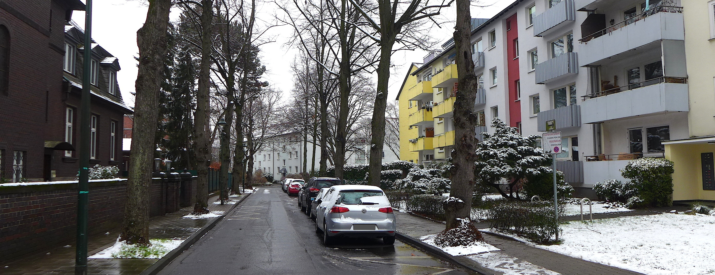 улица "Ан дер Данкескирхе" (У Церкви Благодарения) в административном районе Бенрат, Дюссельдорф.